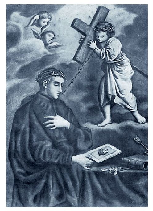 Agustin Kardaberaz idazlea